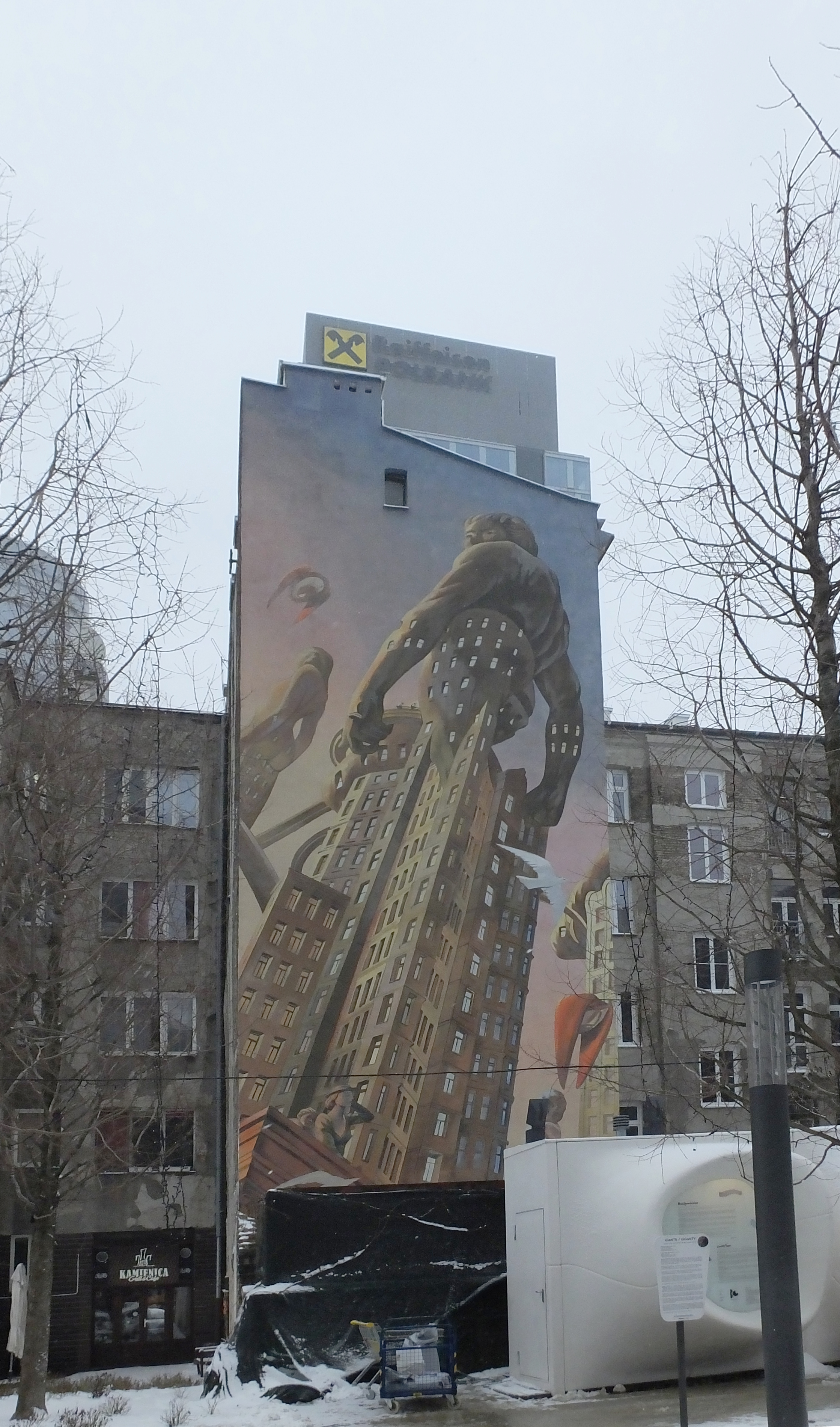 Jeden z murali grupy Good Looking Studio (autorzy: François Schuiten i Rafał Olbiński) na kamienicy przy Grzybowskiej 71 w Warszawie od stronty placu Europejskiego